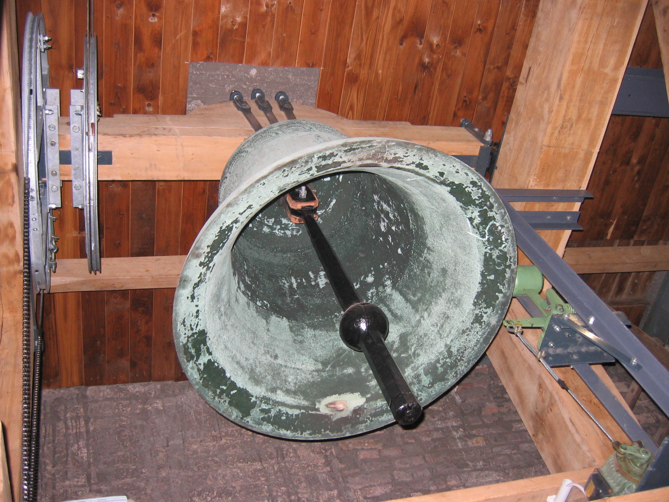 Felixglocke. St. Aposteln, Köln.